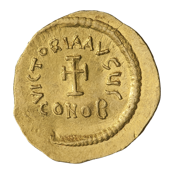 Тремиссий. Ираклий. Ок. 610—613 гг. (реверс)